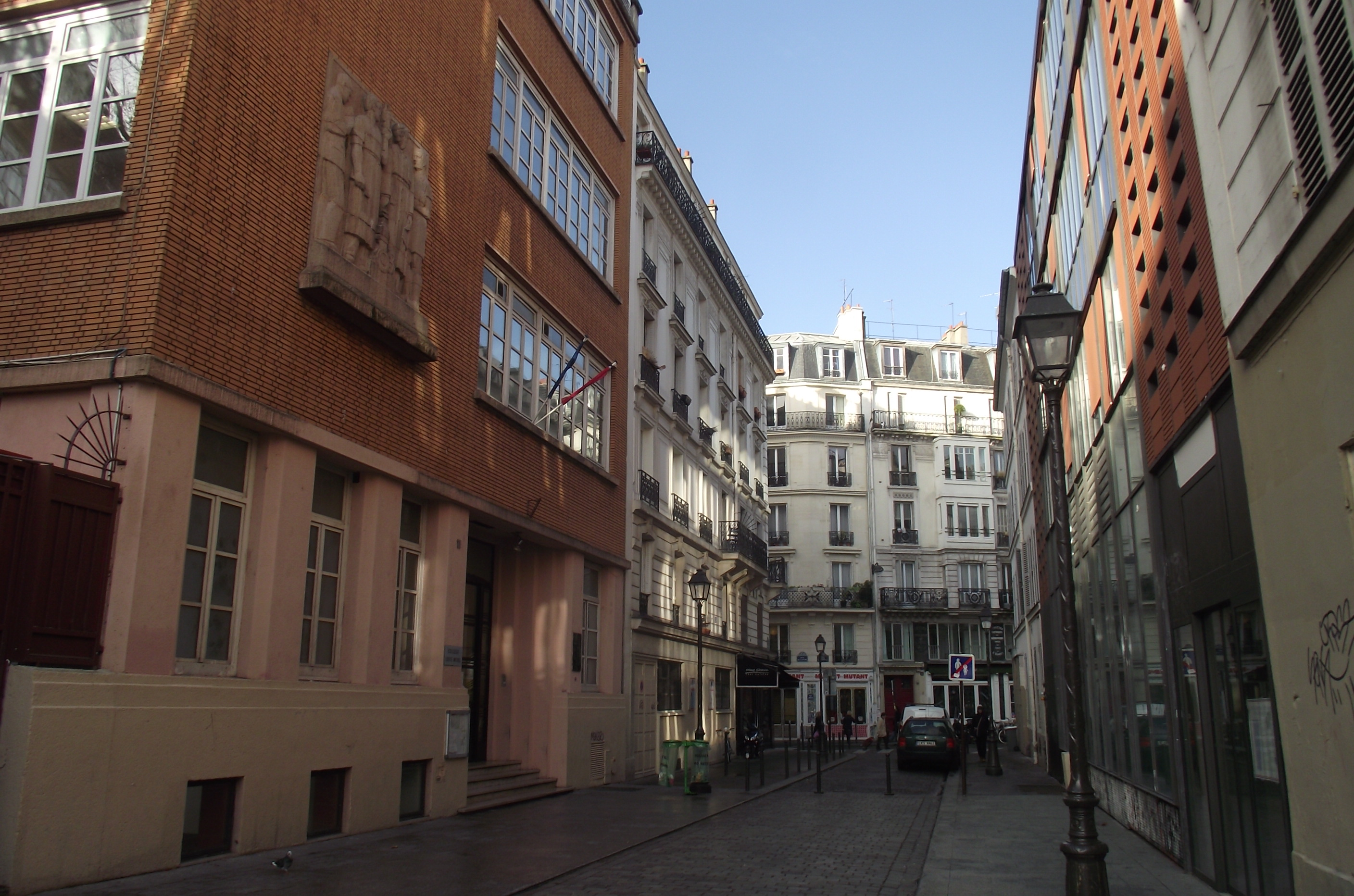 Collège Louise-Michel à Paris rue Jean-Poulmarch